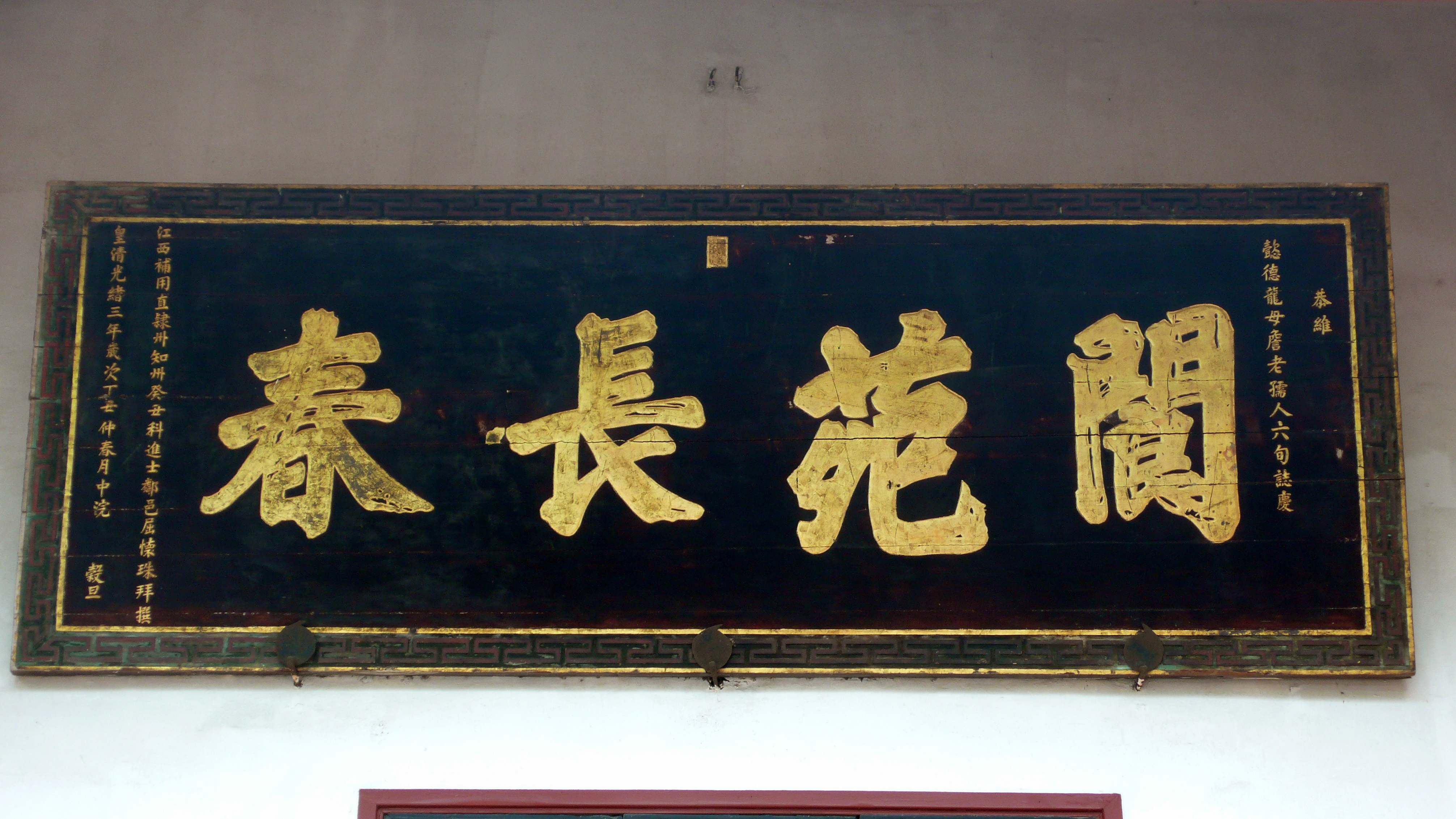 中文（台灣）: 咸豐三年三甲進士屈懷珠閬苑長春